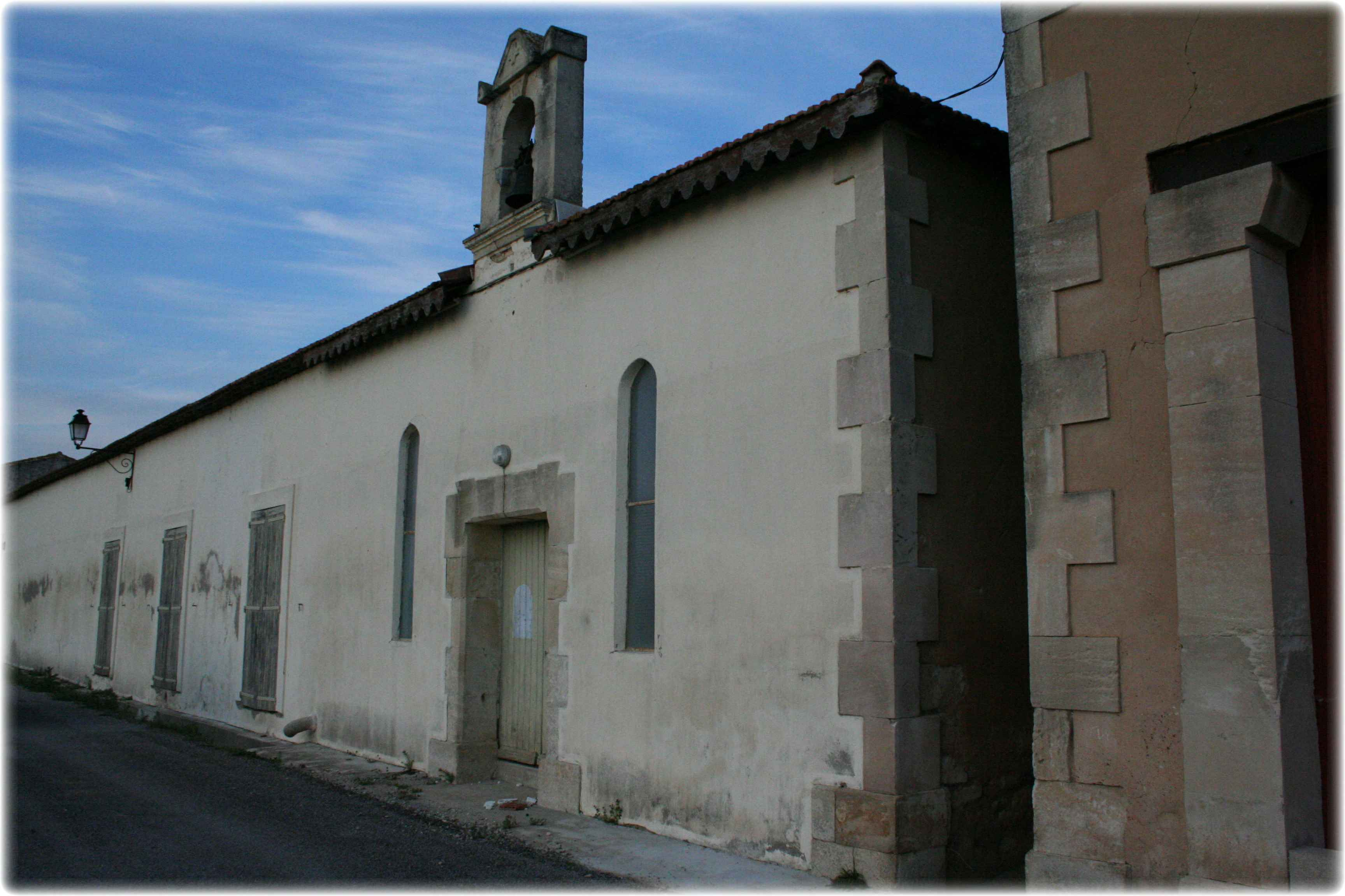 Franquevaux - Reliquat de la chapelle de l'Abbaye Auteur: R. BENEZET Date : 21 02 2007